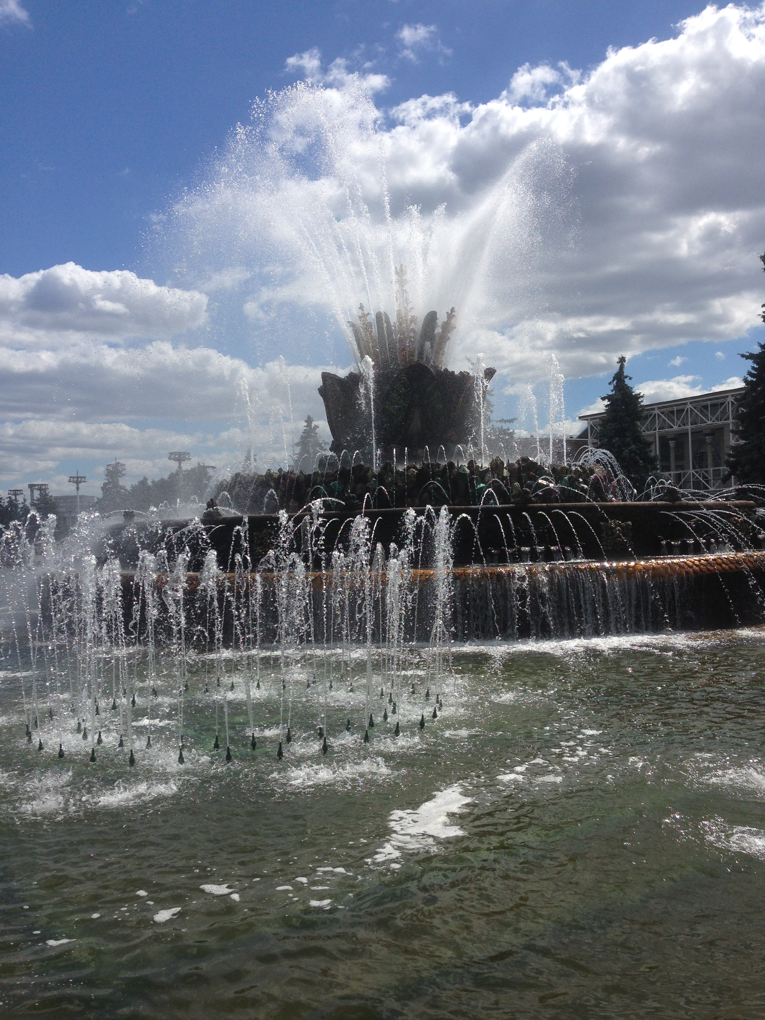 Фонтан "Каменный цветок": Останкинский, Северо-Восточный округ, Москва